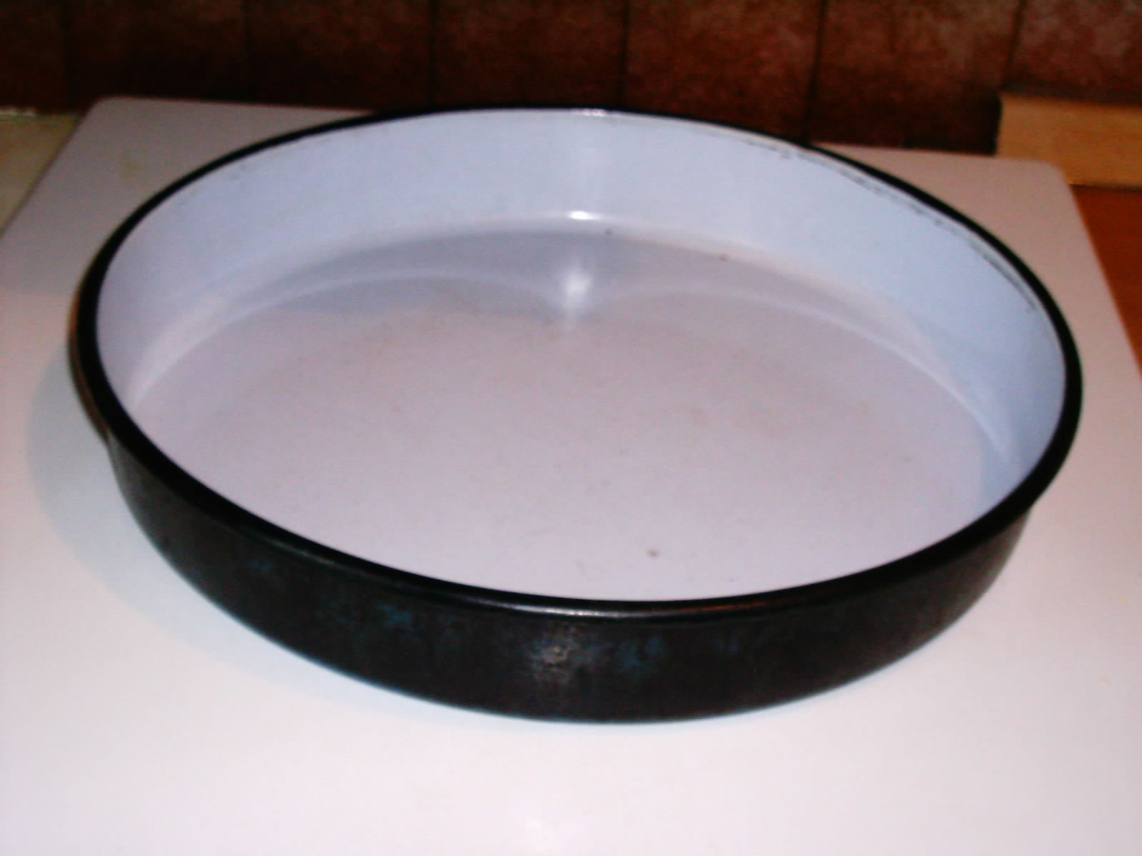 Округла тепсија.